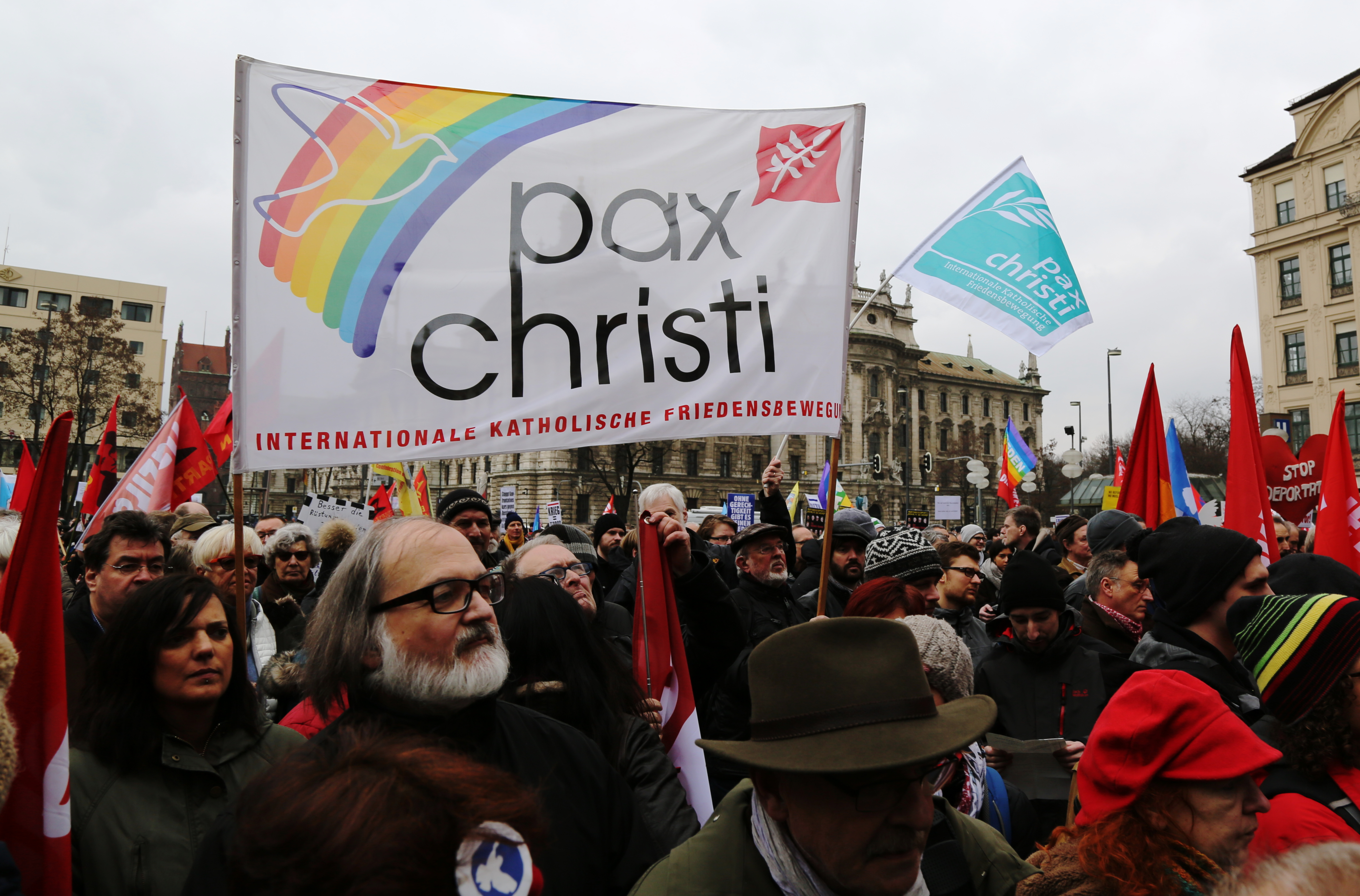 Transparente von Pax Christi auf der Demonstration gegen die Sicherheitskonferenz in München am 18. Februar 2017